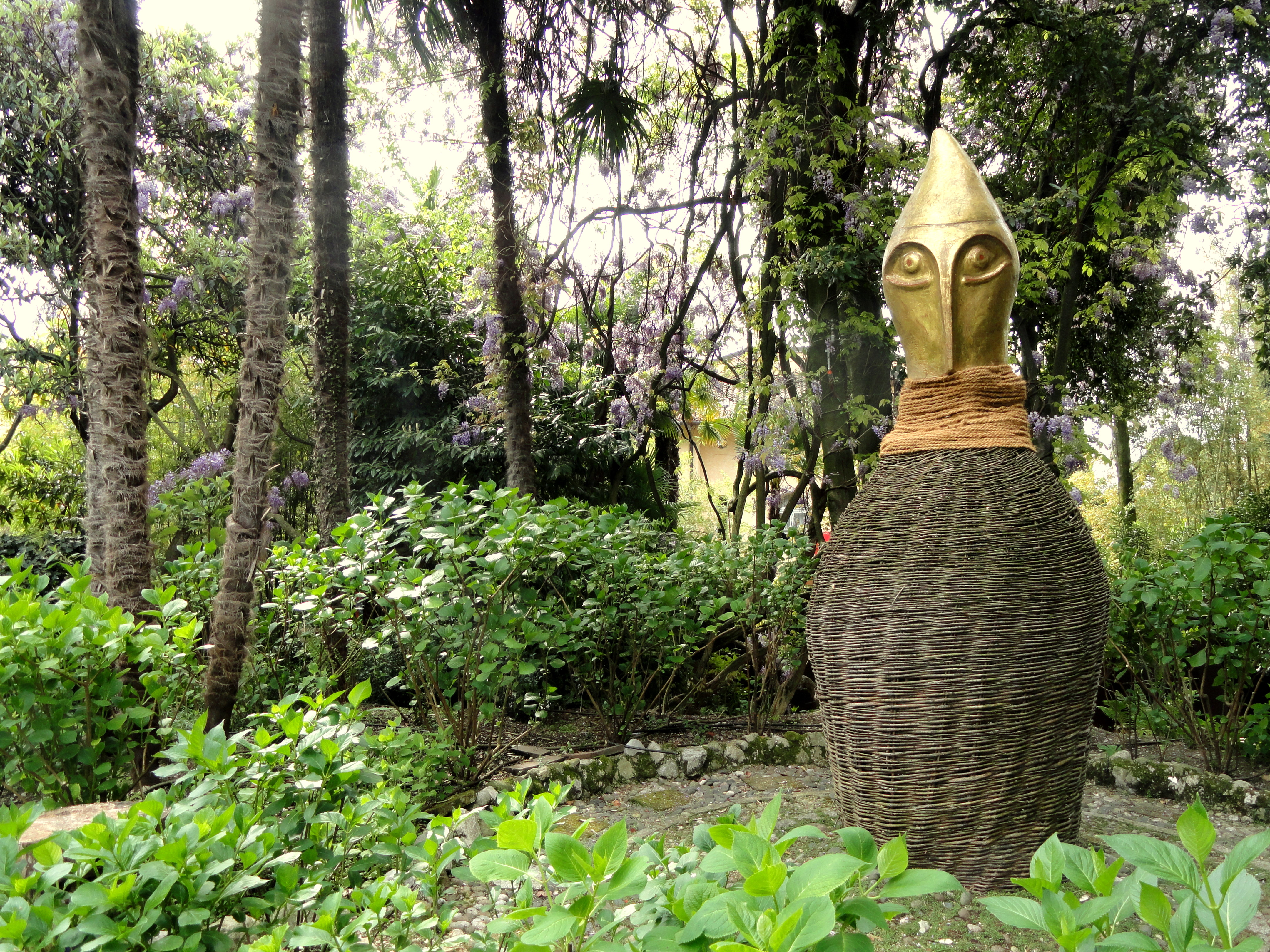 Giardino Botanico Fondazione André Heller, in Gardone Riviera, on Lake Garda, Brescia, Italy.